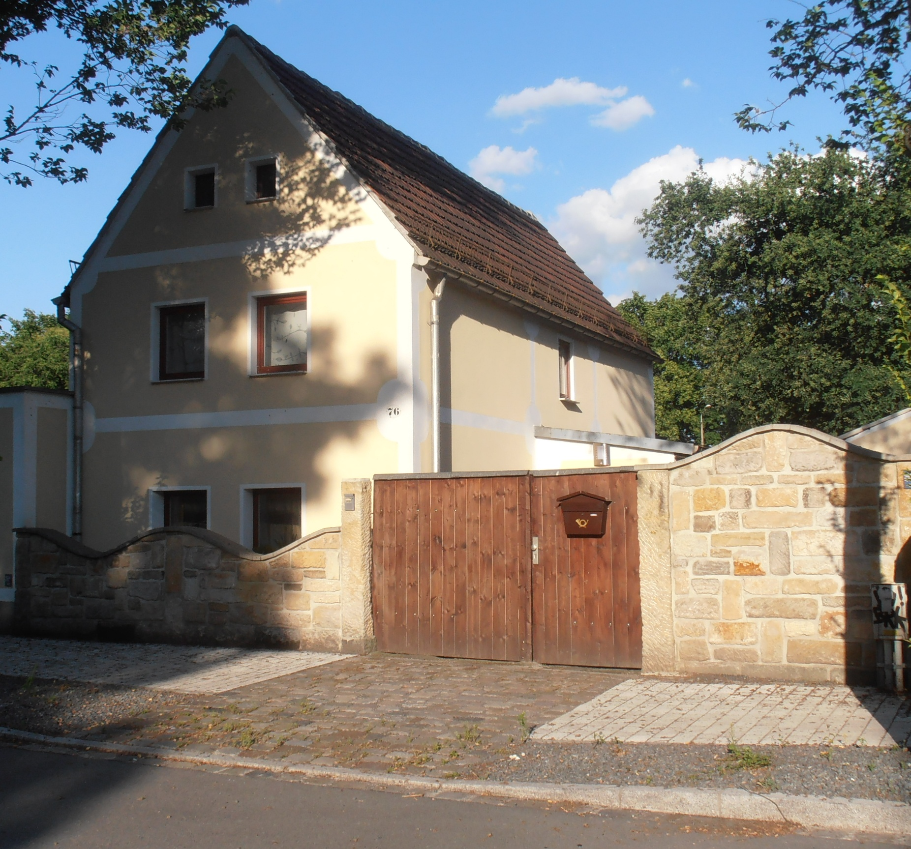 Letztes heute noch vorhandenes Haus des Neudorfer Dorfkernes